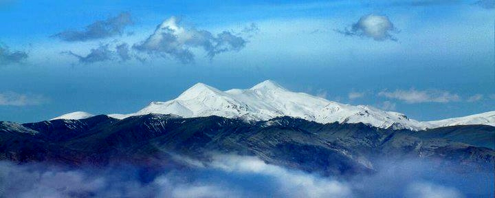 کوه اورین.خوی